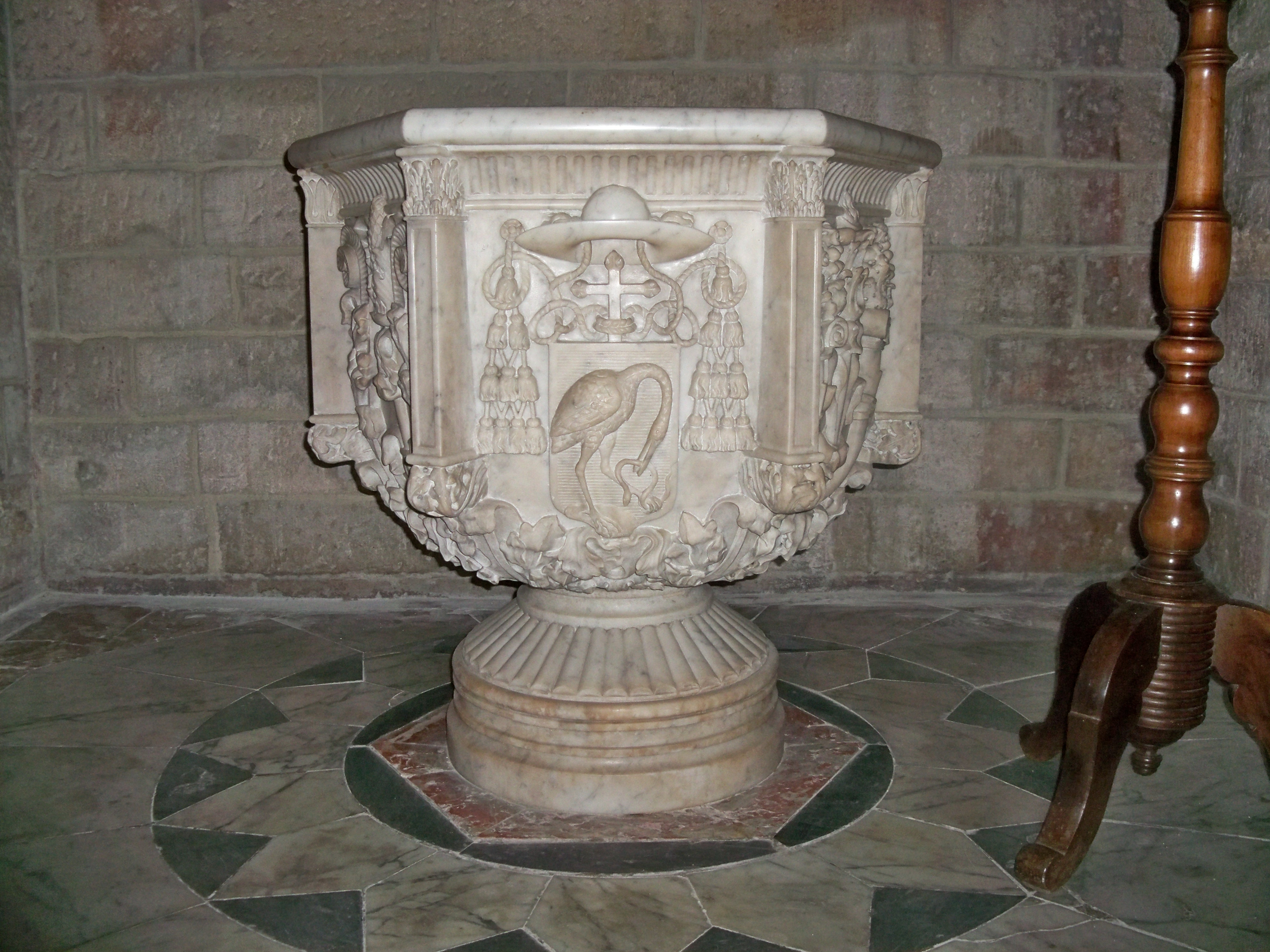 Fonds Baptismaux de la collégiale St Agricol d'Avignon